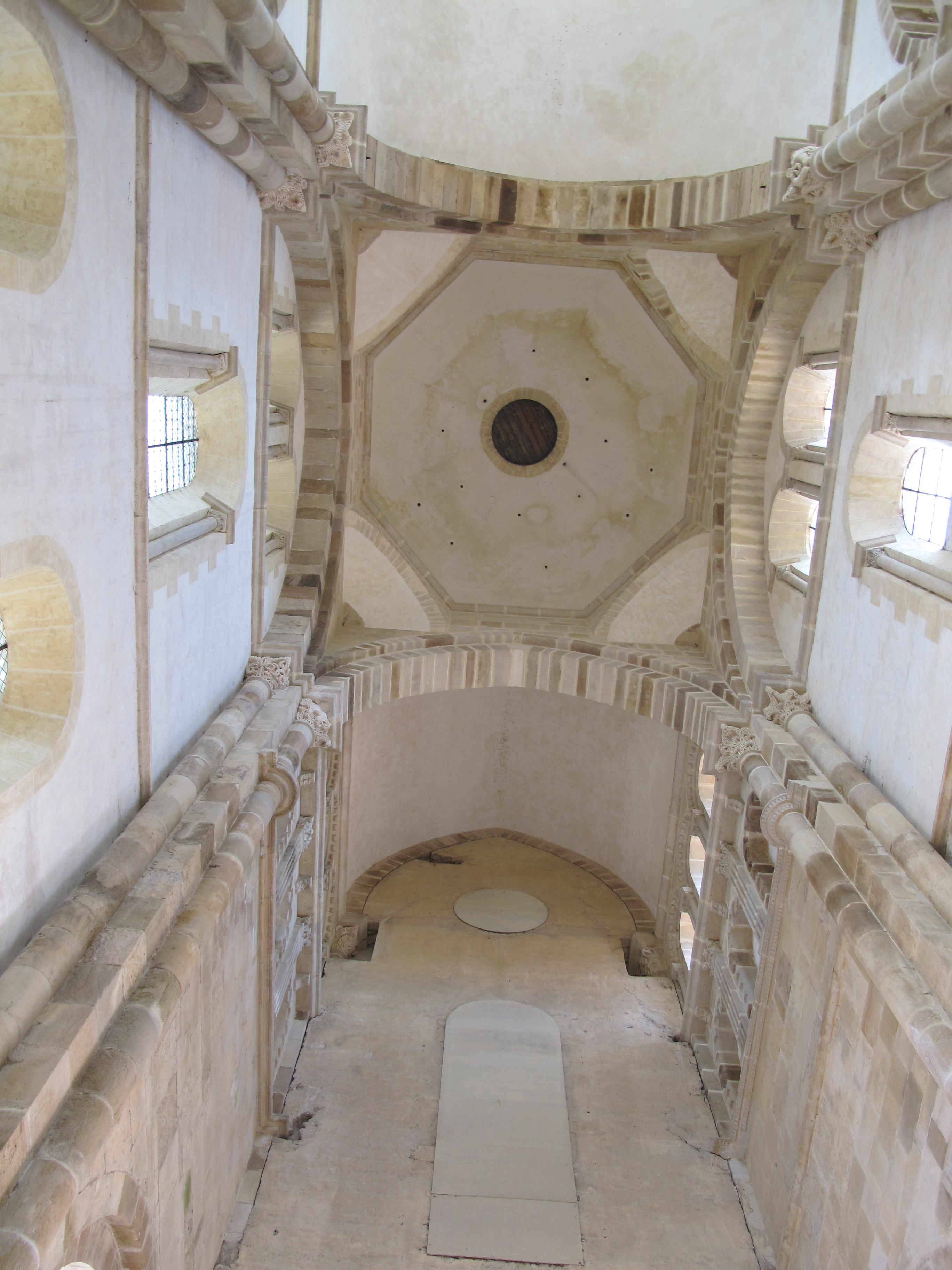 Transept d'église abbatiale de Cluny